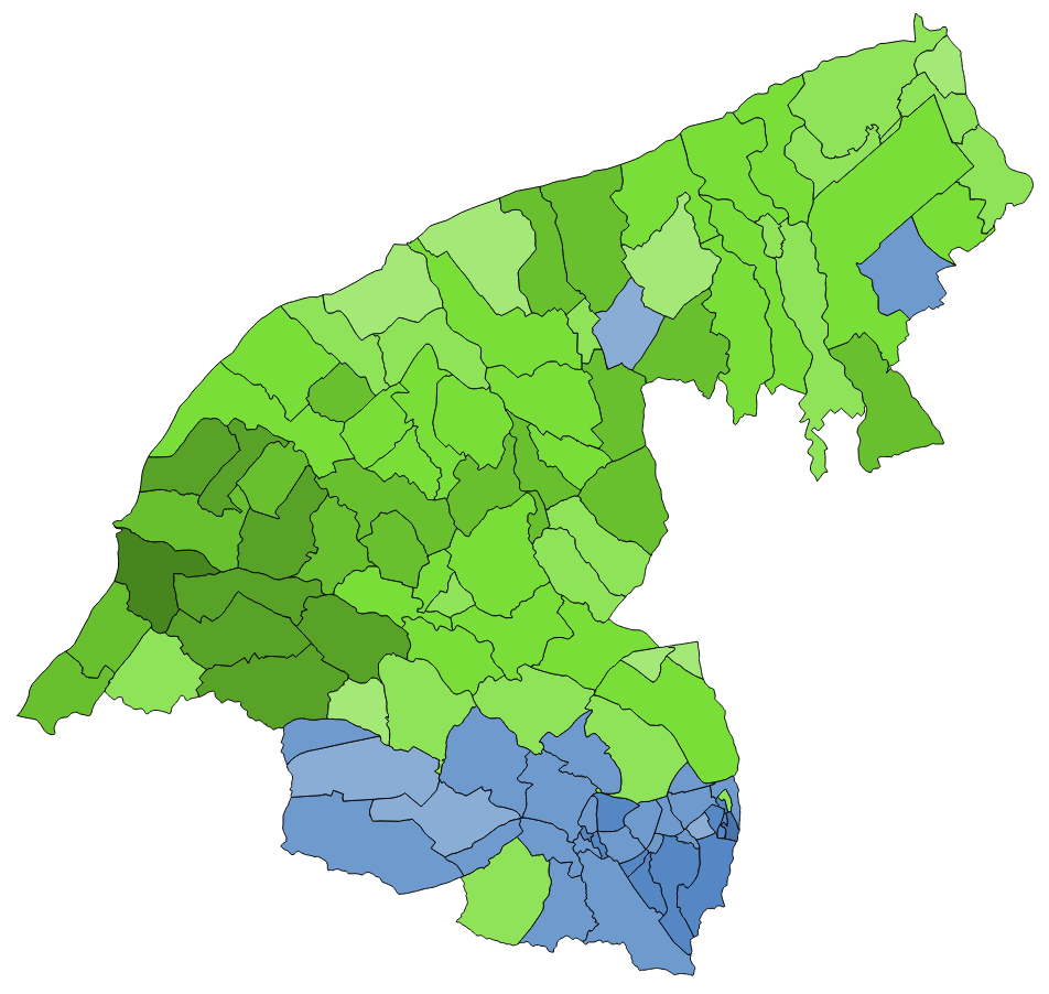 中文（台灣）: 顏色對照表